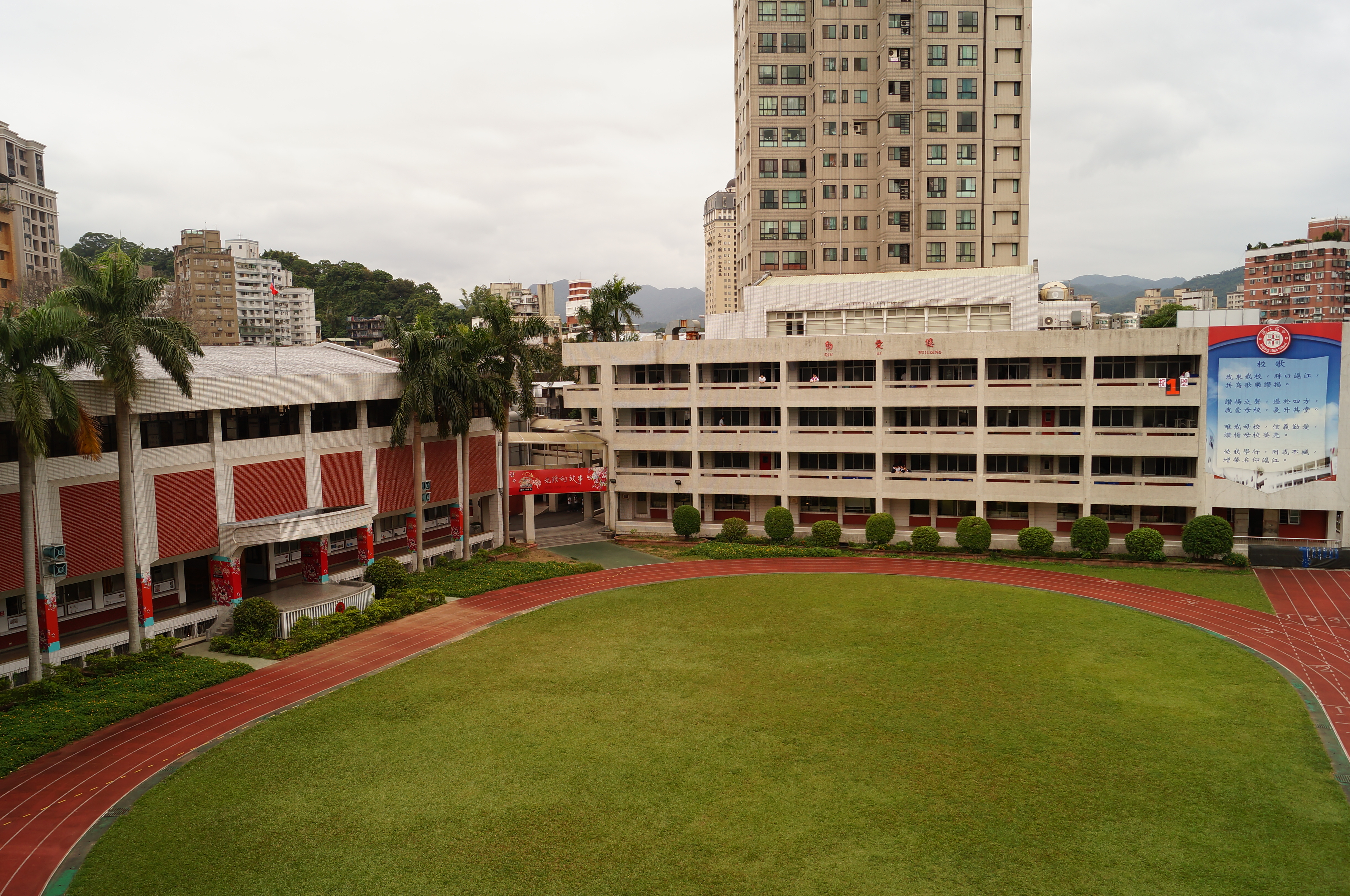 中文（台灣）: 滬江高中 勤愛樓與中正堂連接